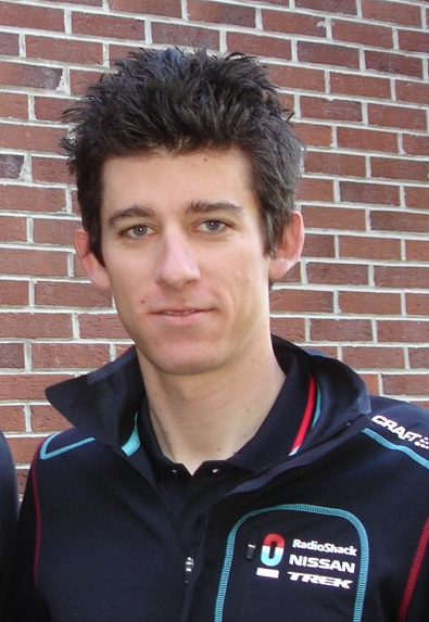 Jesse Sergent à la sortie de l'hôtel avant le Grand Prix de Fourmies